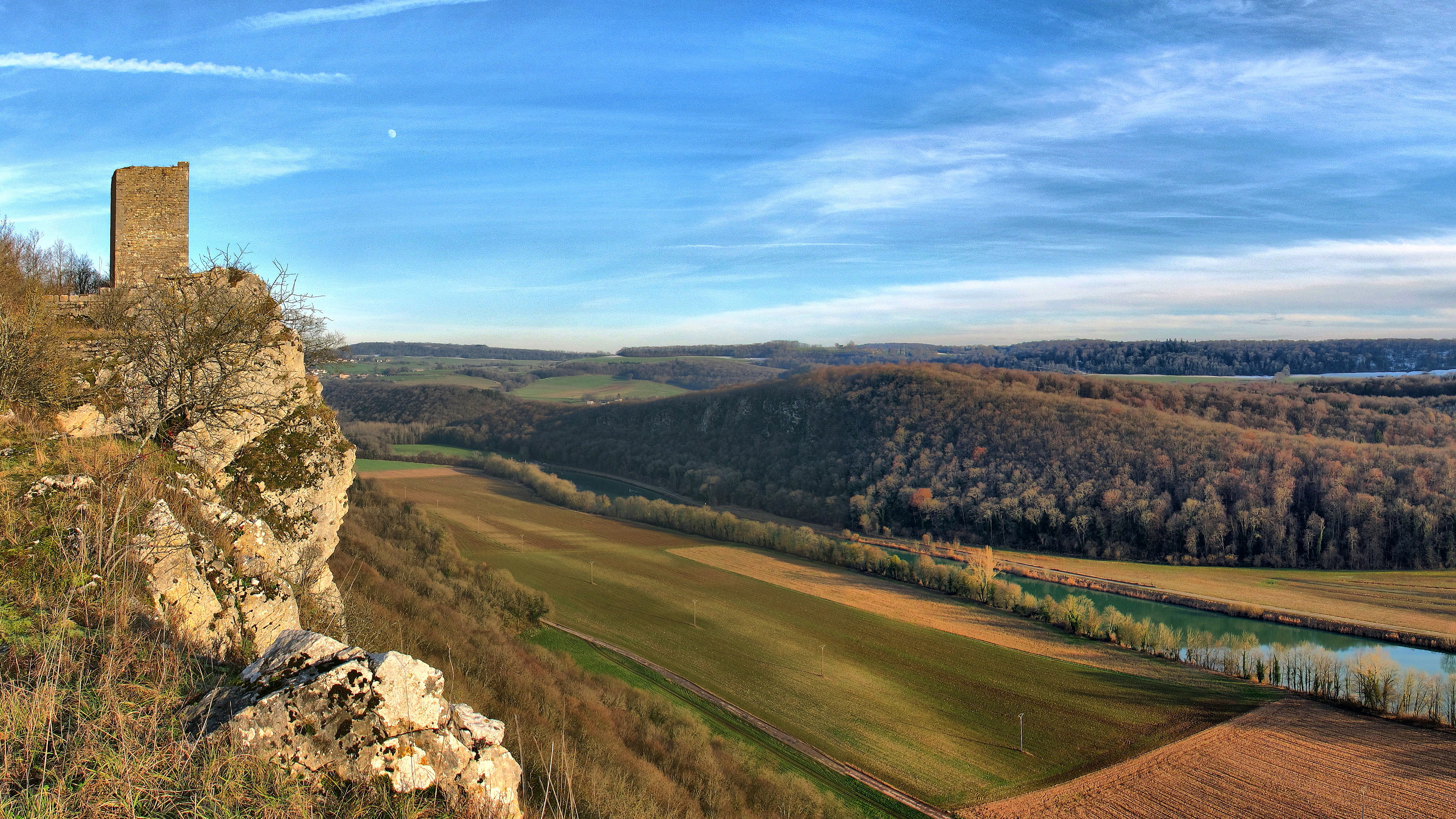 Château de Montferrand-le-Château (Inscrit) .